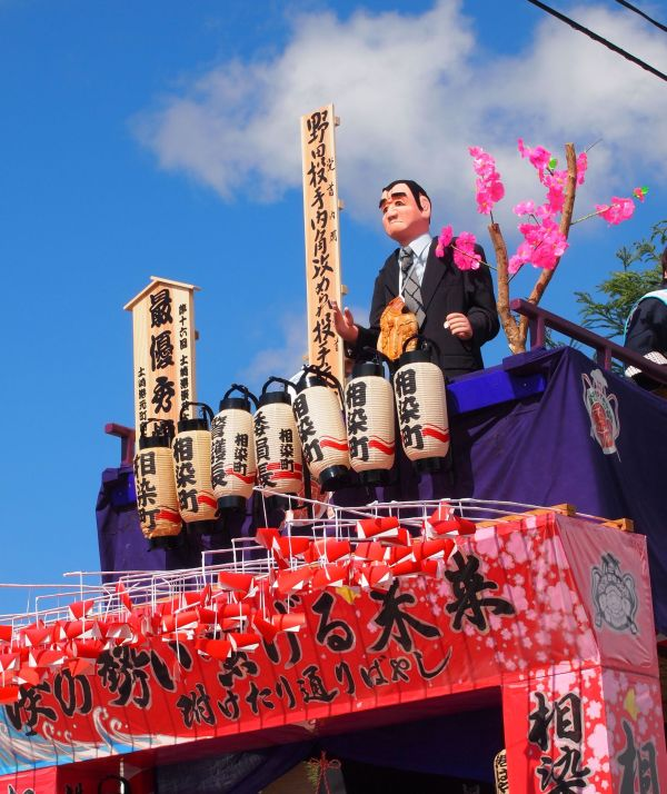 Tsuchizaki-Shinmeisha-Shrine Annual Celebration And The Float Festival (Akita City, Japan)